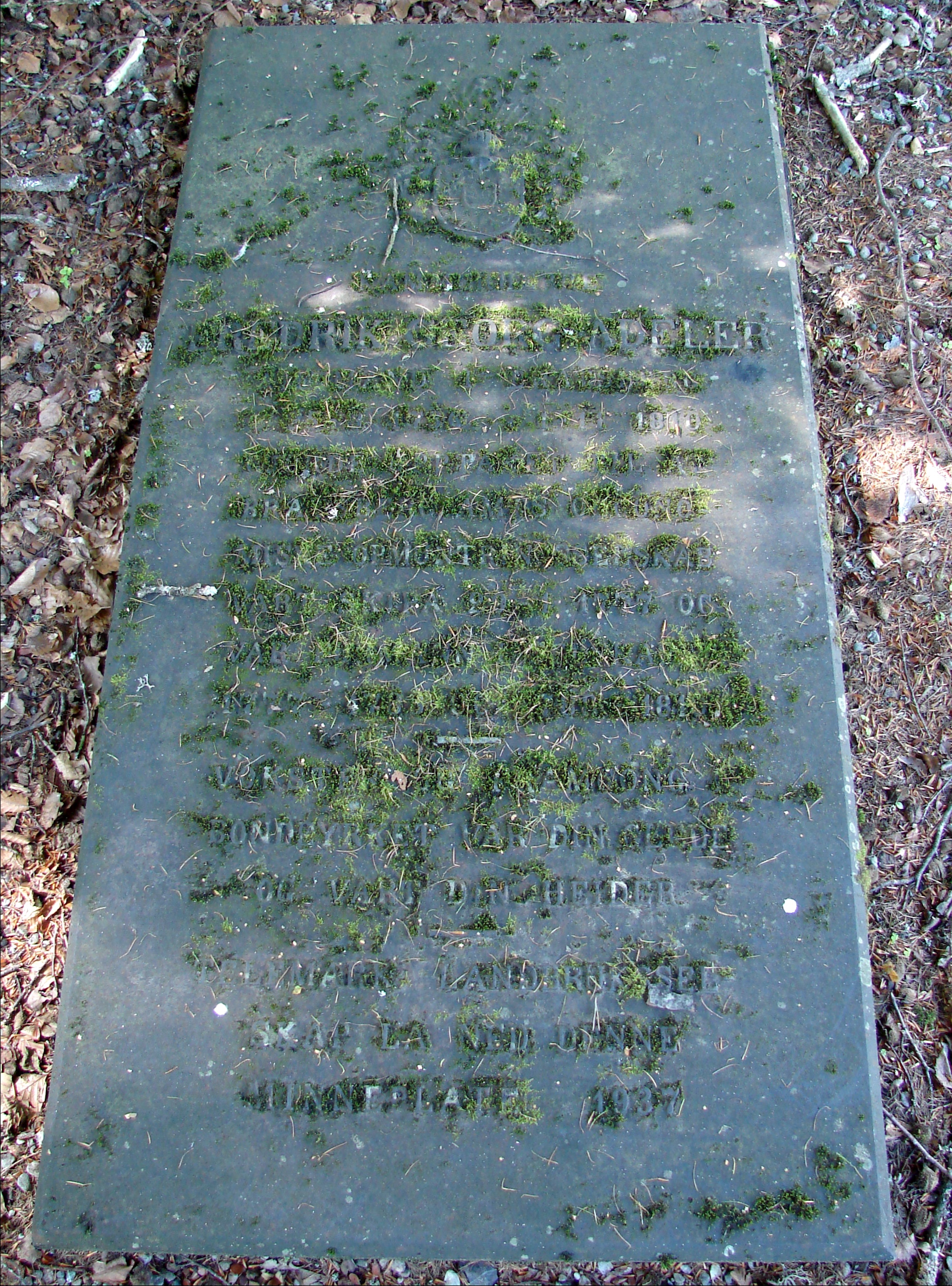 Mindeplade over Frederik Georg Adeler (1736—1810), Solum Kirkes kirkegård, Telemark